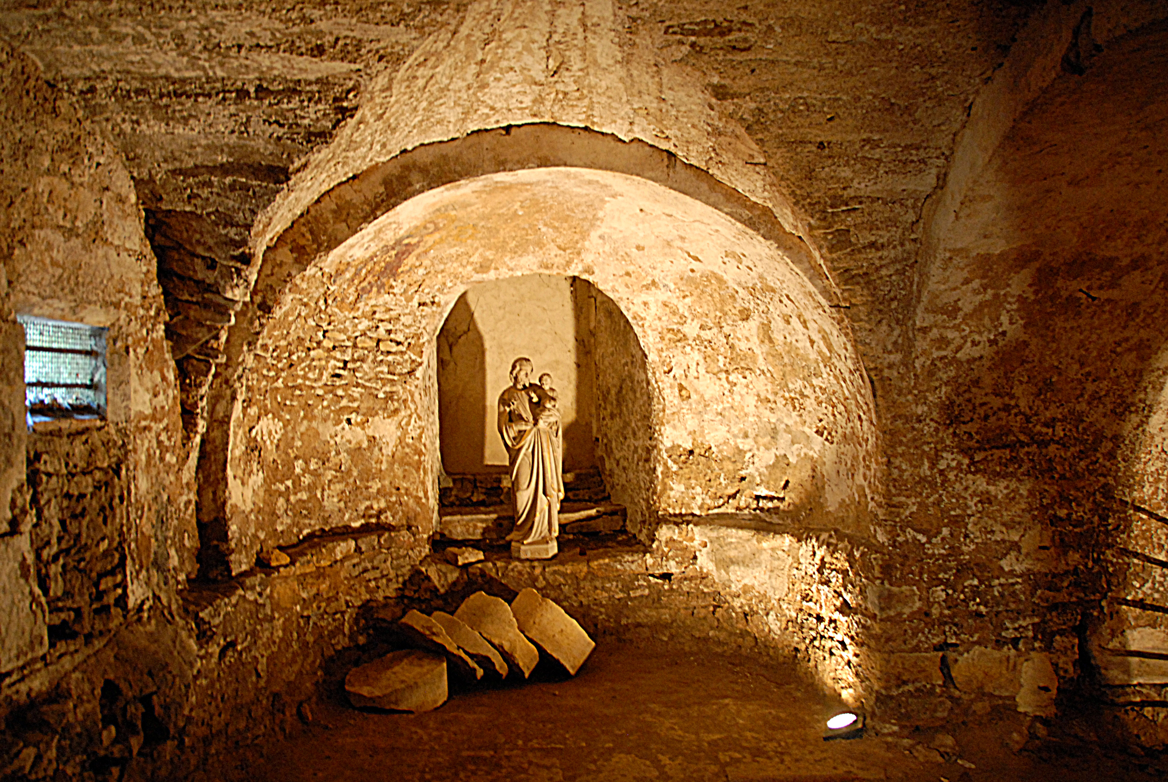 Krypta